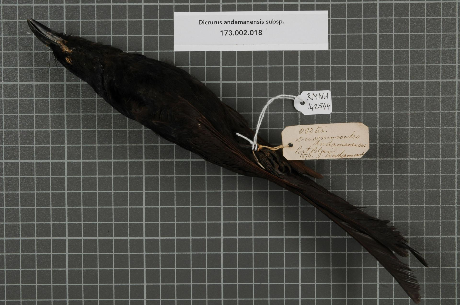 Dicrurus andamanensis subsp.